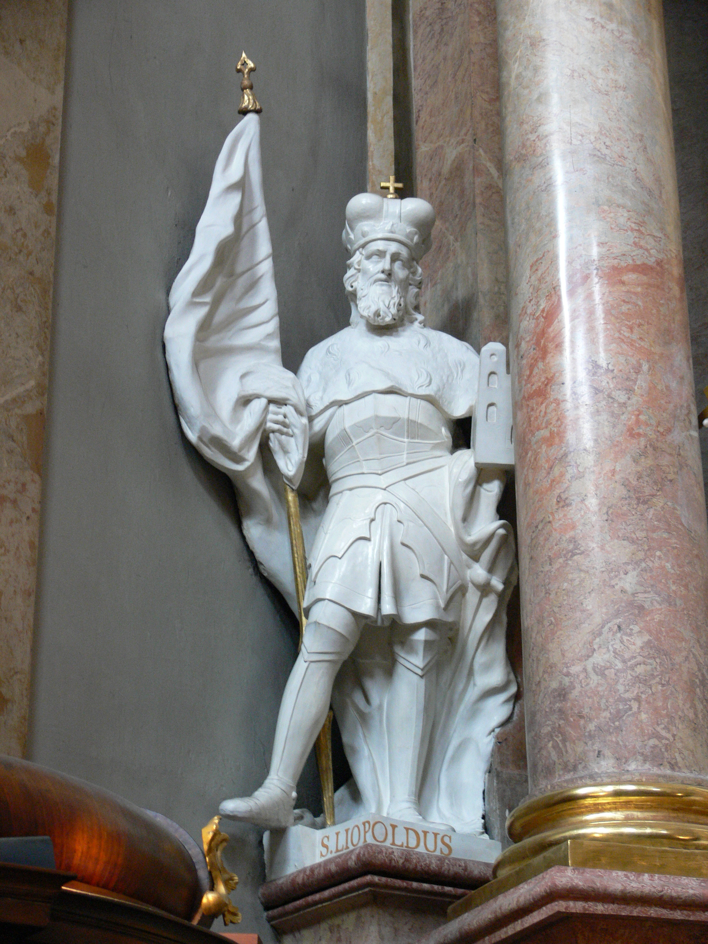 Wien, Peterskirche, Heiligenstatue St. Leopold